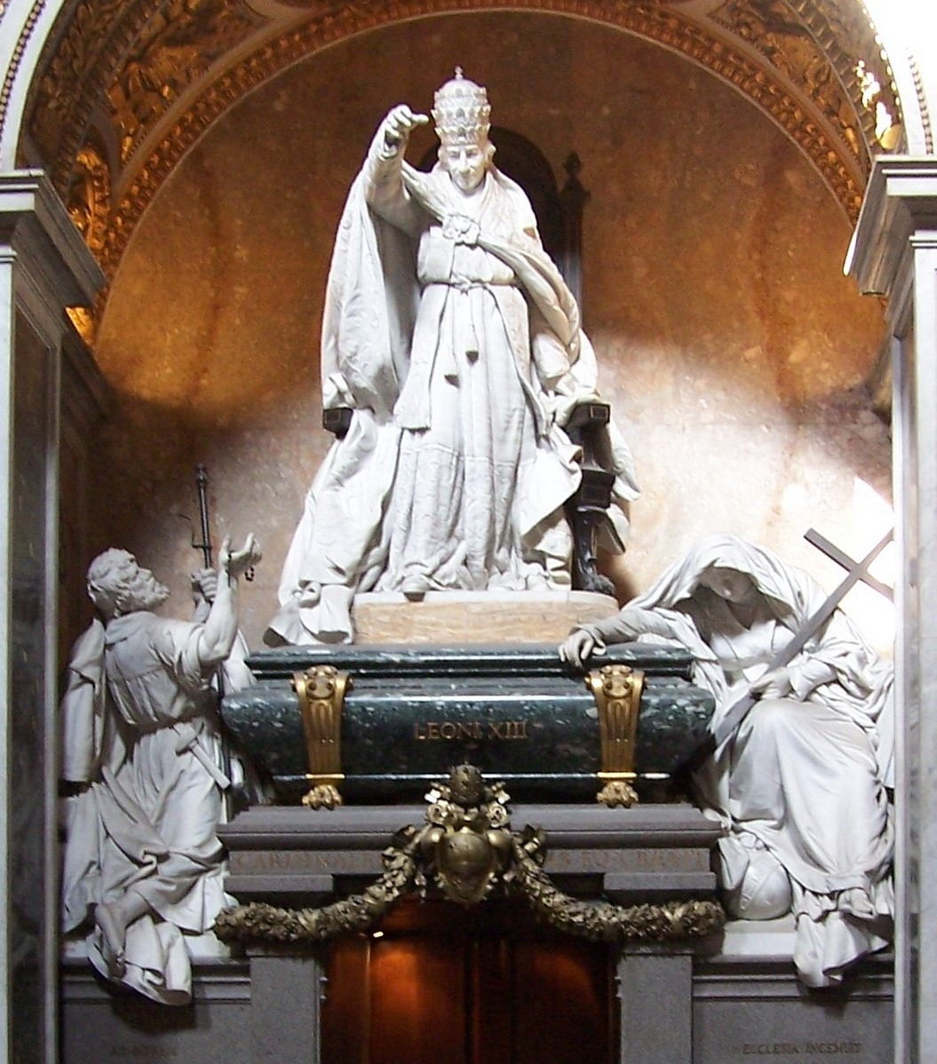 Grab Leo XIII